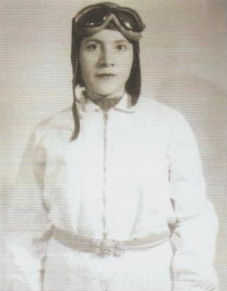 Hermelinda Urvina, primera aviadora de Ecuador y Latinoamérica.